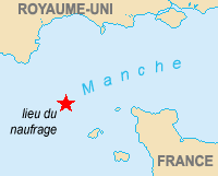 Localisation du naufrage du chimiquier Ece Carte par pixeltoo 3 février 2006 à 23:28 (CET) Historique de la carte originale (suppr) (actu) 16 février 2006 à 14:24 . . Sting. . 202x163 (6448 octets) (Nouvelles couleurs; + légendes) (suppr) (rétab) 3 février 2006 à 19:28 . . Pixeltoo . . 200x161 (5888 octets) ({DP} create by myself -- )